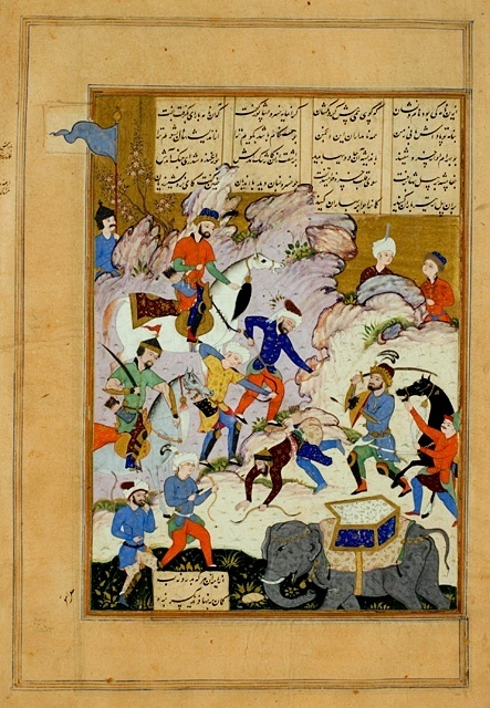 Битва между Хосровом Парвизом и Бахрамом Чубина